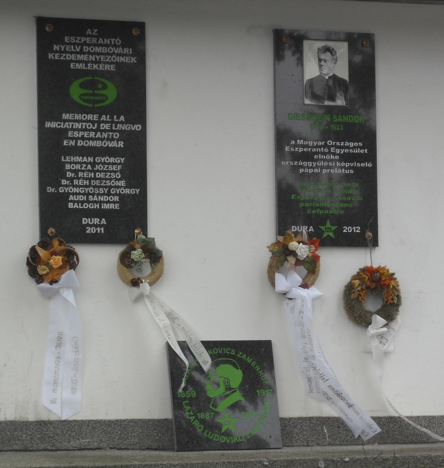 Memortabulo de Sándor Giesswein kaj esperantistoj de Dombóvár en urbo Dombóvár.